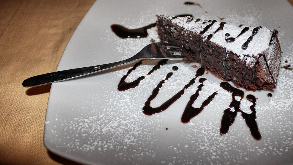 Burro 250 gr Cioccolato fondente 250 gr Mandorle pelate 300 gr Uova (medio-grandi) 5 Zucchero 200 gr